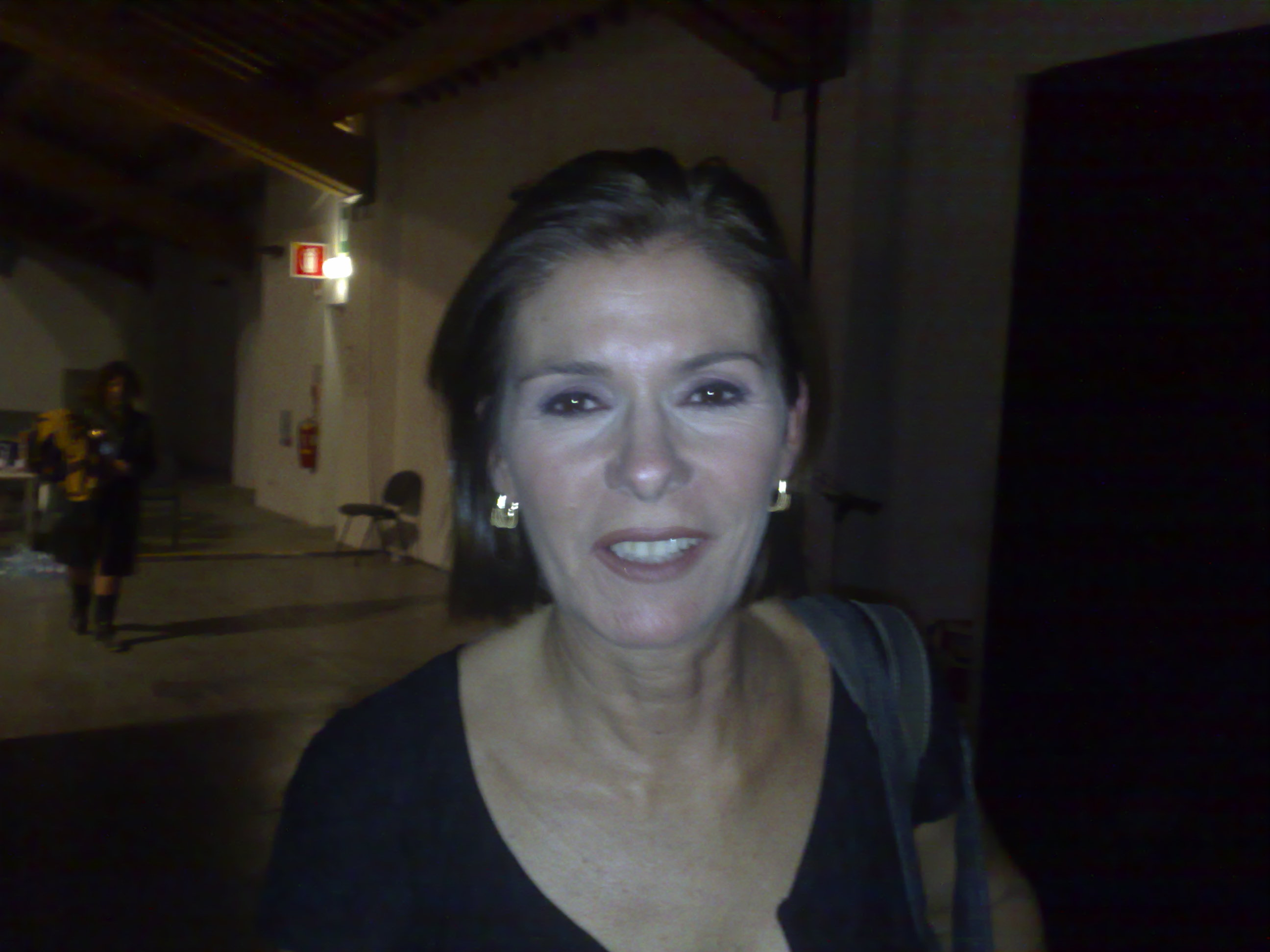 Bianca Berlinguer a Firenze al Festival della creatività.